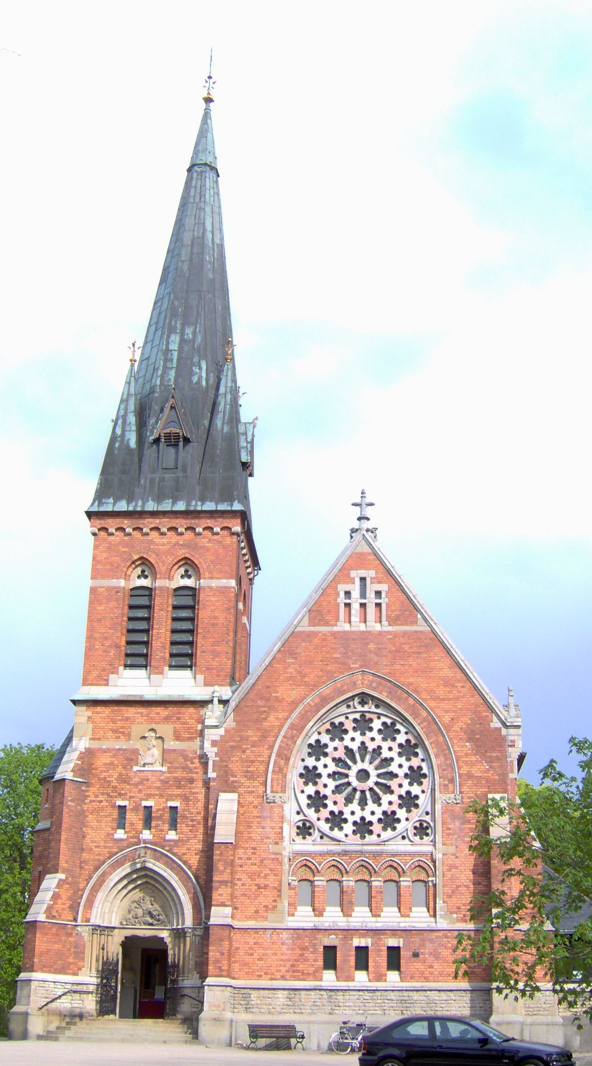 Gustaf Adolfskyrkan, Oscars församling, Stockholm, Sverige FILNAMN MISSVISANDE